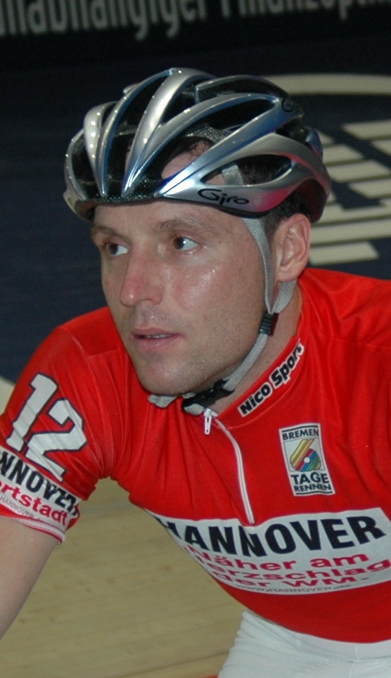 Guido Fulst, Radrennfahrer